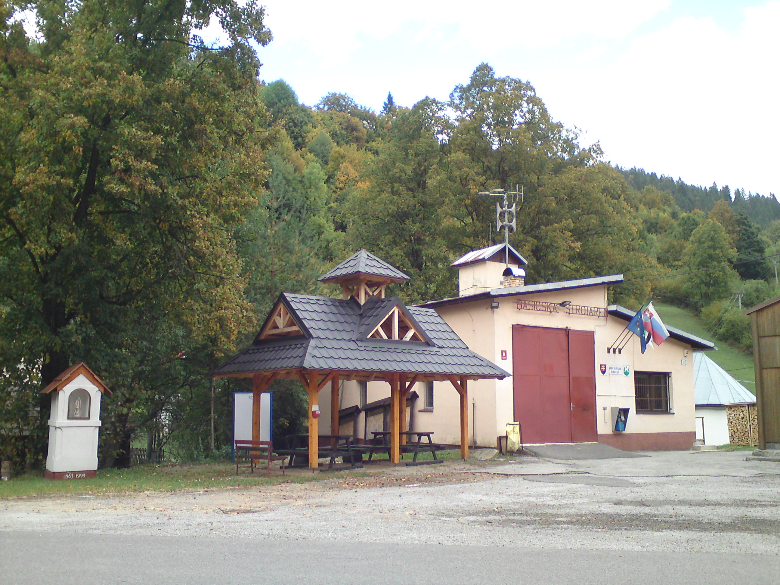 Stred obce Turecká